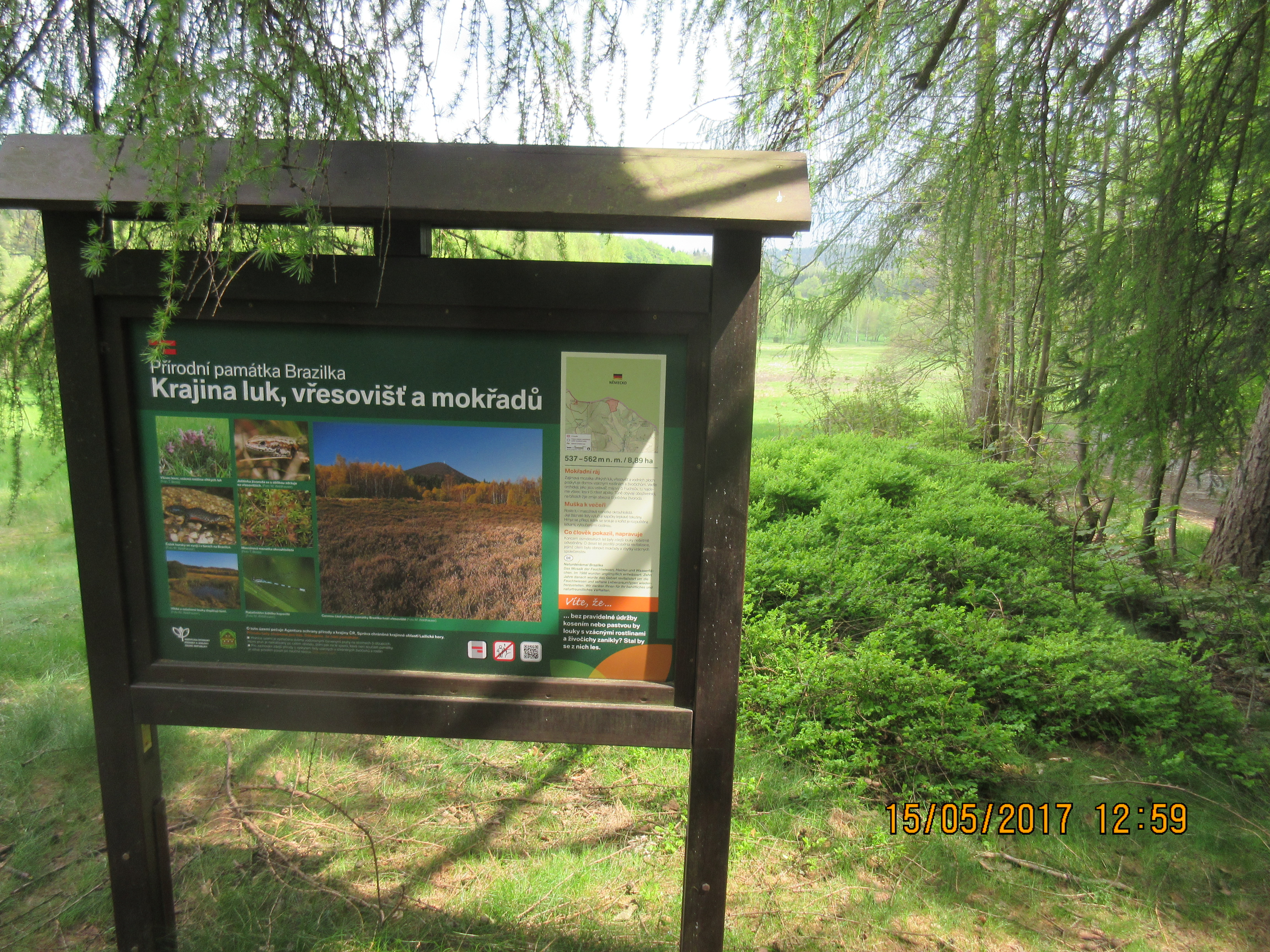 Tabule na horním okraji přírodní památky